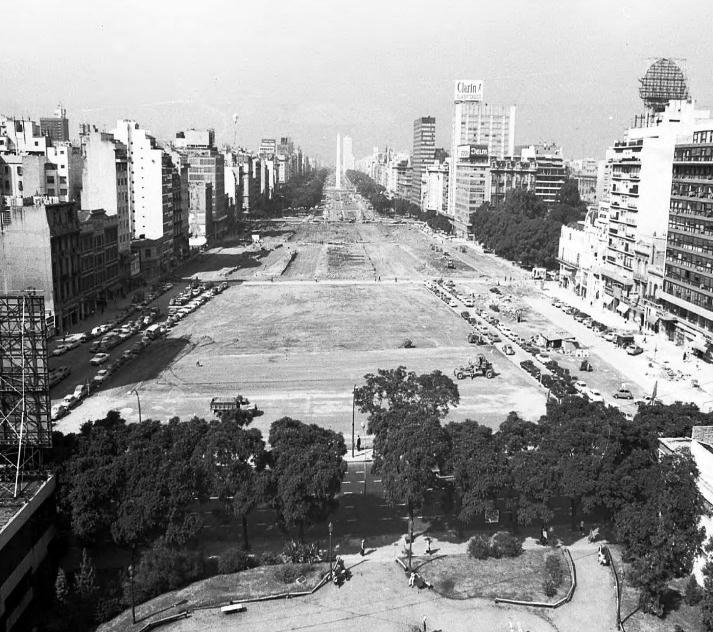 Vista de la Avenida Nueve de Julio desde la calle Arenales. En primer plano se ve la traza de la Avenida Santa Fe y la Plaza Fray Mocho, que ocupaba la vereda impar de Santa Fe entre Carlos Pellegrini y Cerrito. La extensión de la Av. Nueve de Julio hasta Avenida Santa Fe fue inaugurada en 1971, por lo que la fotografía debe ser próxima a esa fecha. El tramo siguiente, Santa Fe-Arenales, fue inaugurado en 1976.